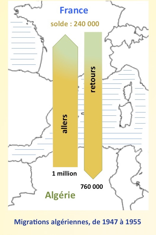 Migrations algériennes entre la colonie et la métropole, de 1947 à 1955. Fond de carte utilisé : Cartes géographiques gratuites pour un usage non commercial.